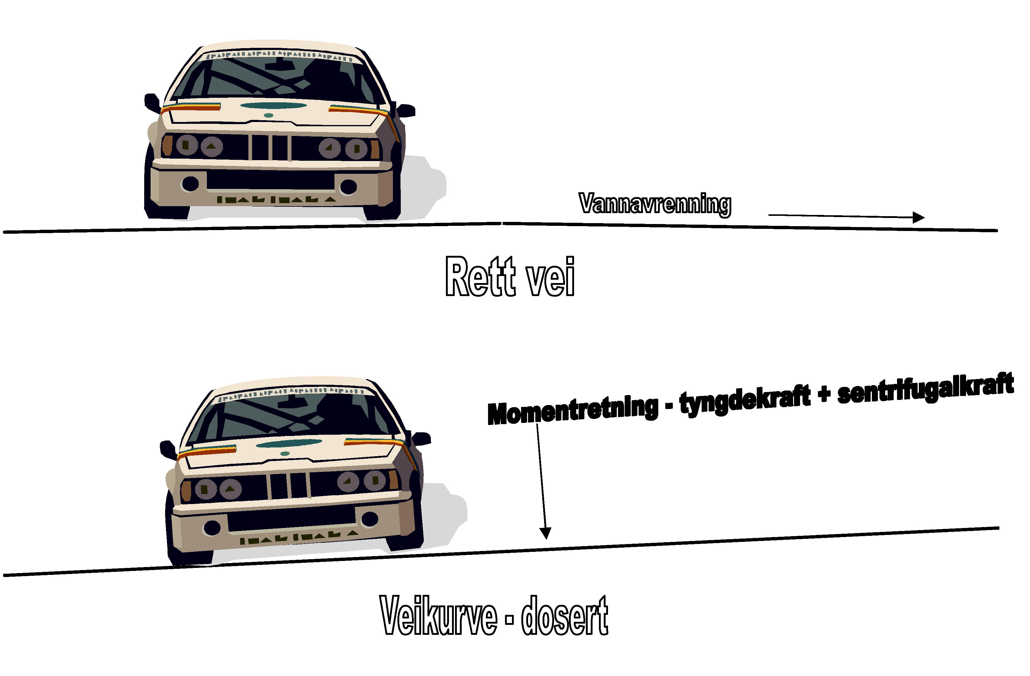 Road profile.